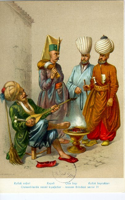 Giovanni Jean Brindesi tarafından çizilen ve Odabaşını tasvir eden bir resim